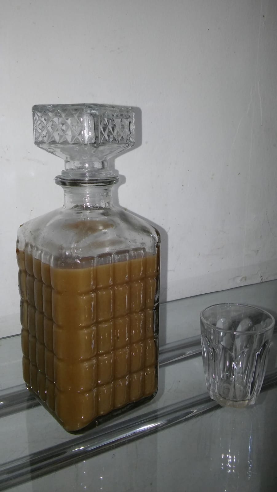 יין צימוקים